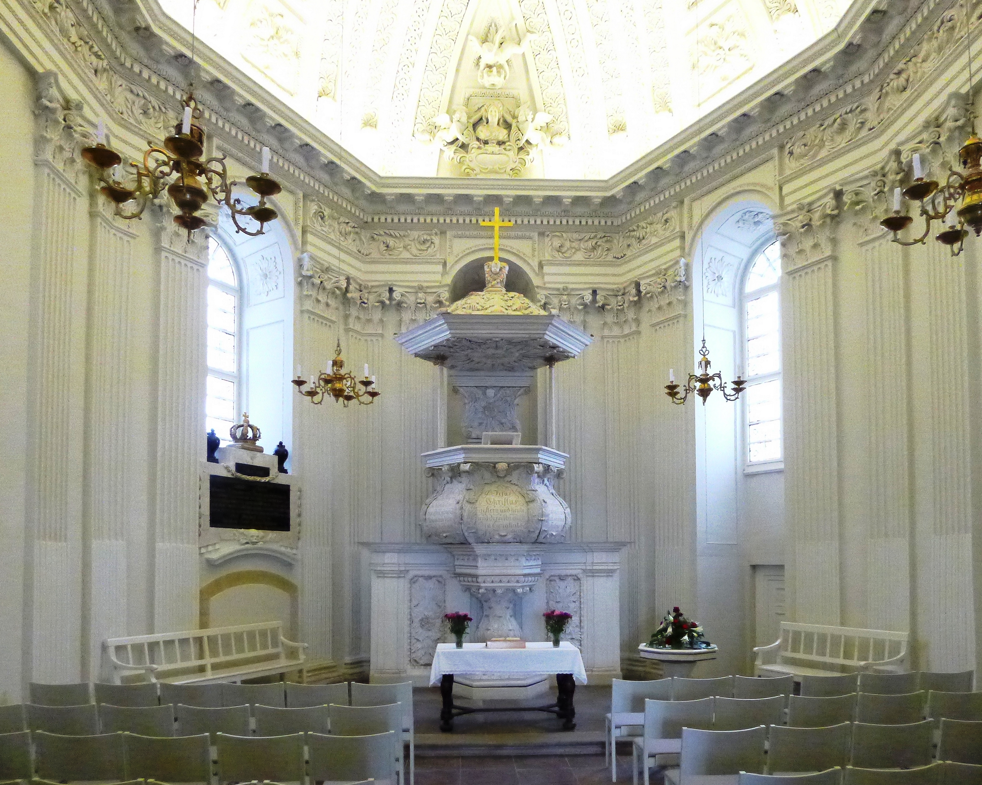 Innenraum der Schlosskirche fotografiert vom Eingang